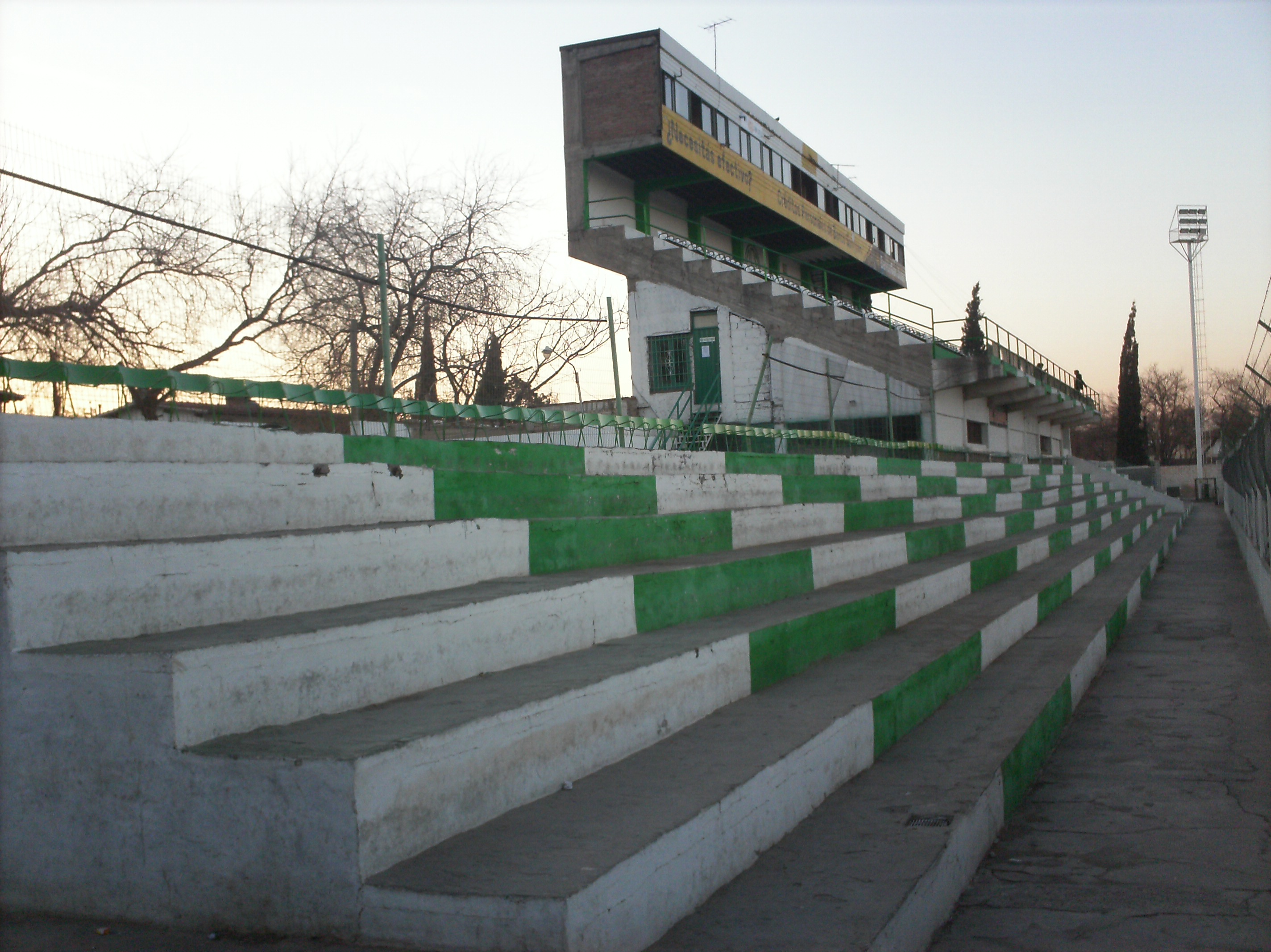 la platea del serpentario y el centro de medios de comunicacion